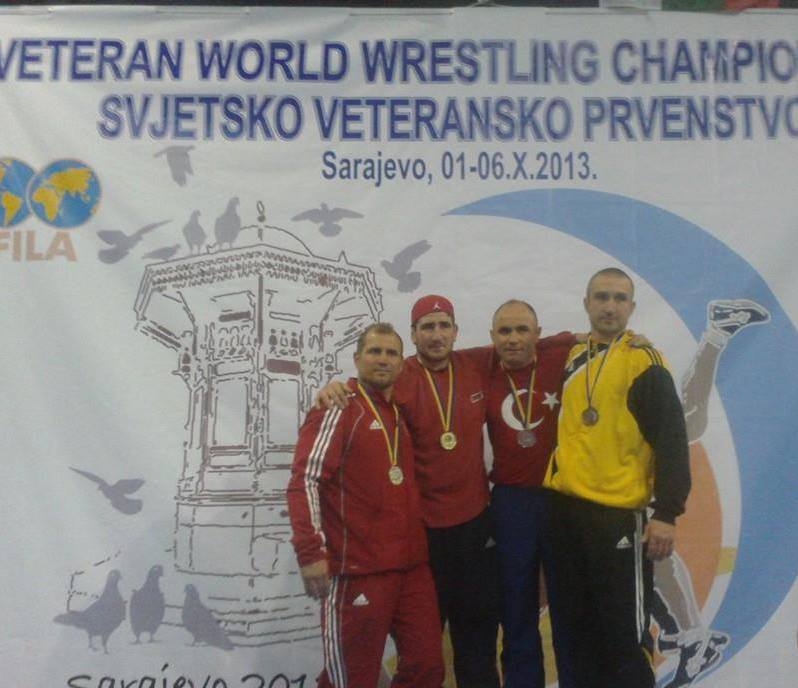 Kadir Gırdoğlu 2013 Dünya Veteranlar Güreş Şampiyonası